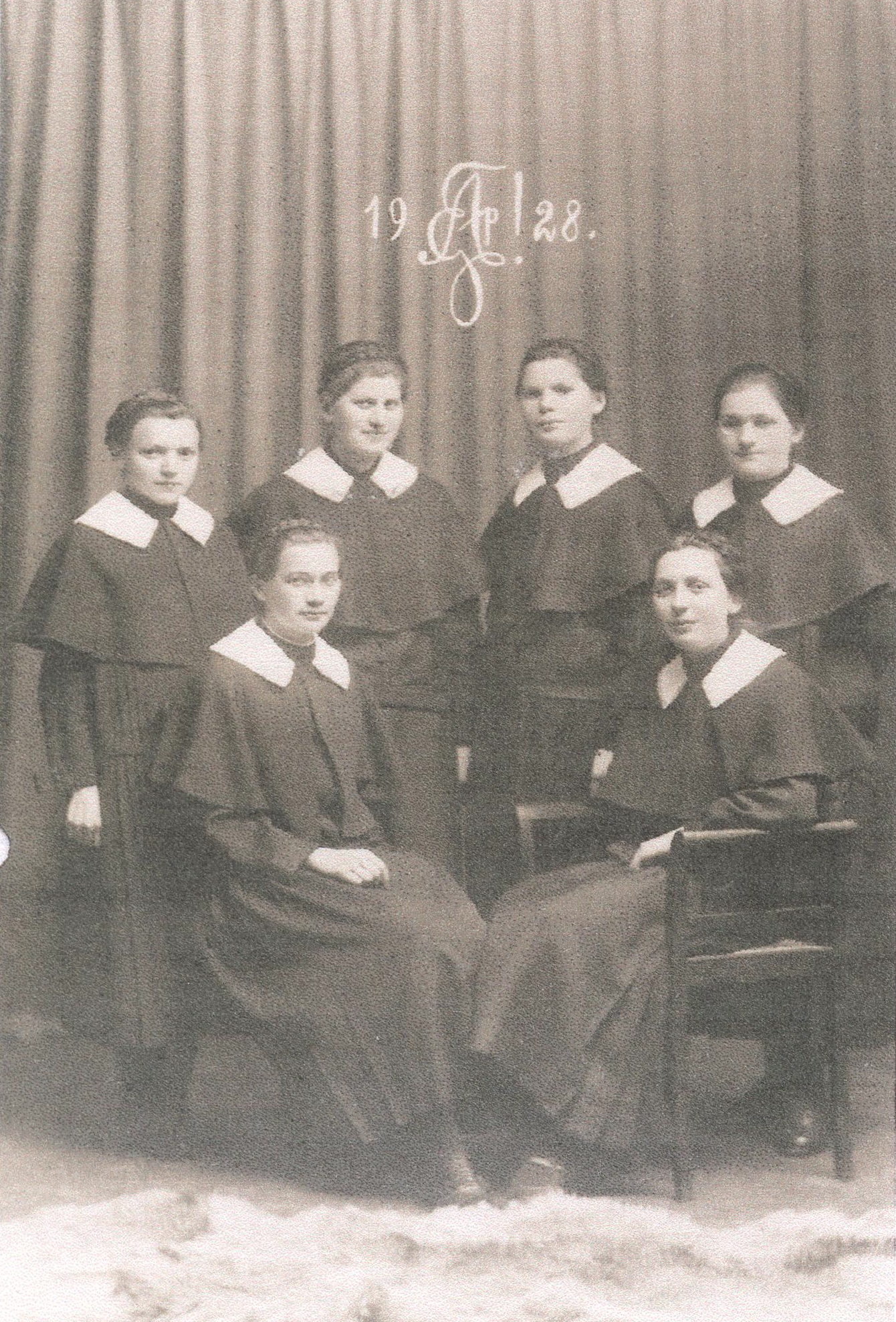 Lehrkurs 1928 am ehemaligen Kindergärtnerinnenseminar in Dillingen/Donau